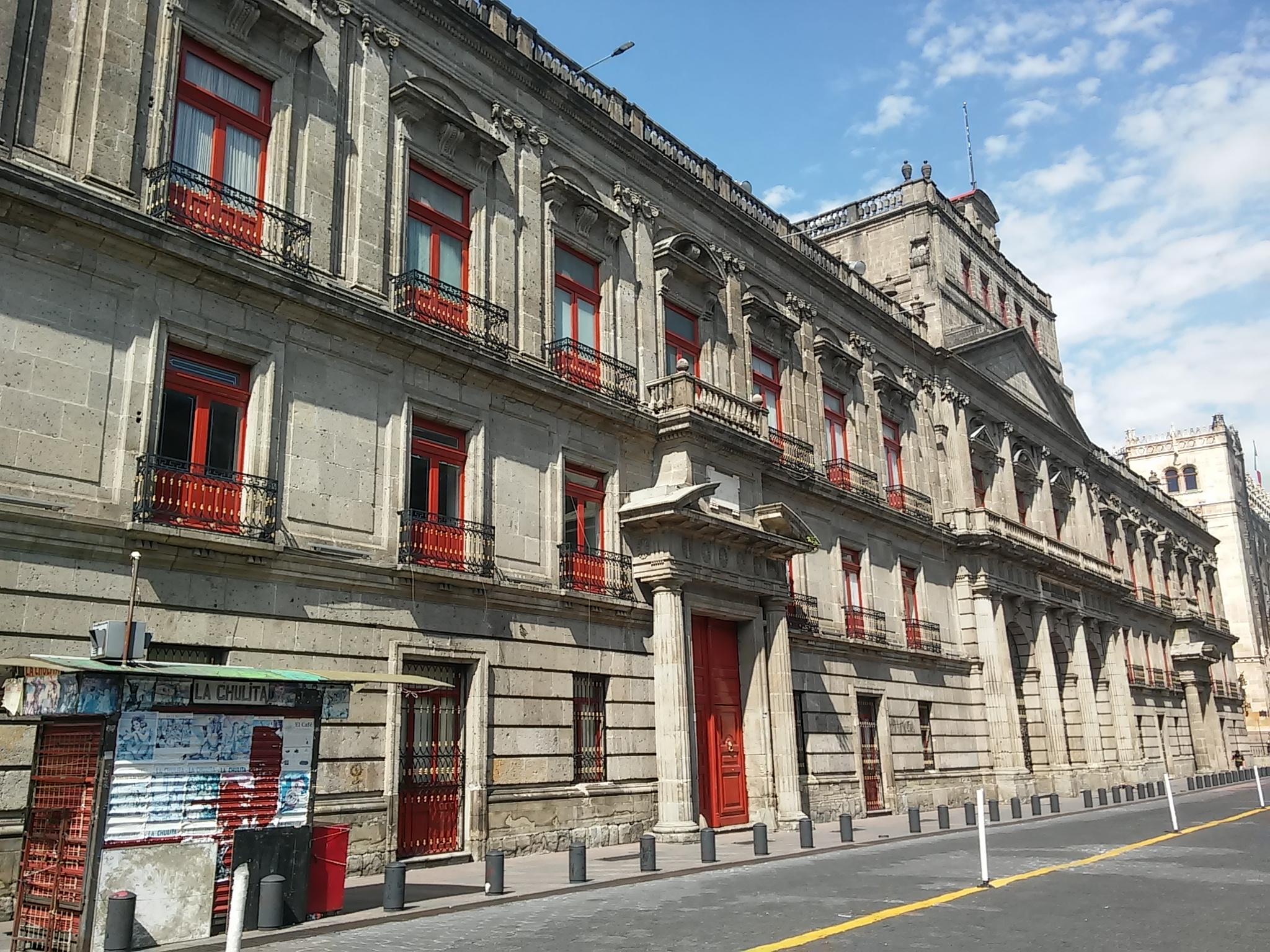 Vista del palacio de minería en el centro histórico de la ciudad de México